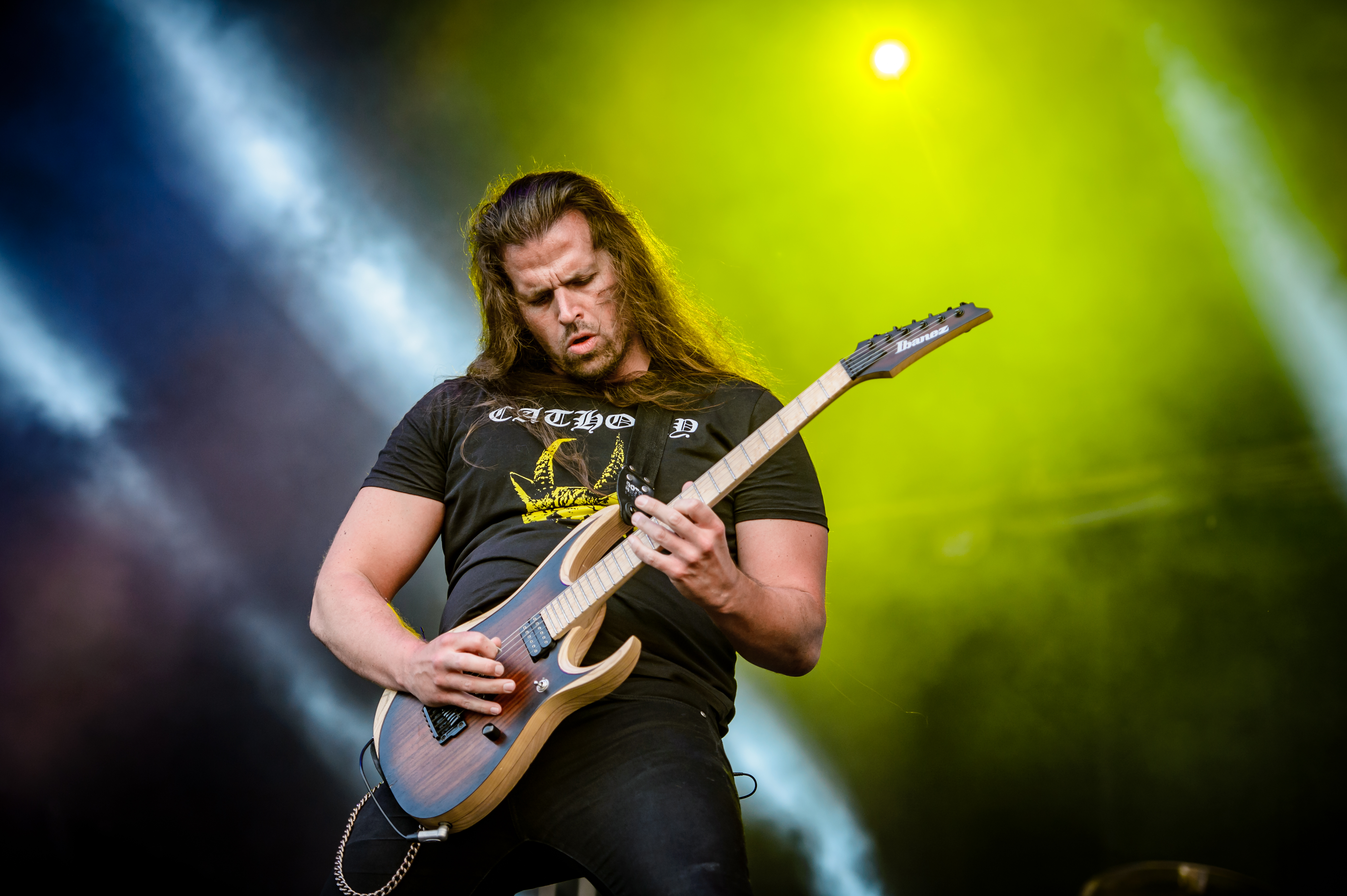 'RockHarz Open Air 2017; Ballenstedt': 'Dark Tranquillity'